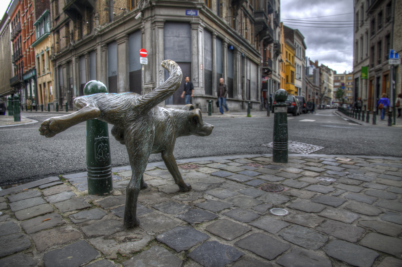 Močící pes Zinneke Pis v centrální části Bruselu (nedaleko třídy Anspach), Belgie